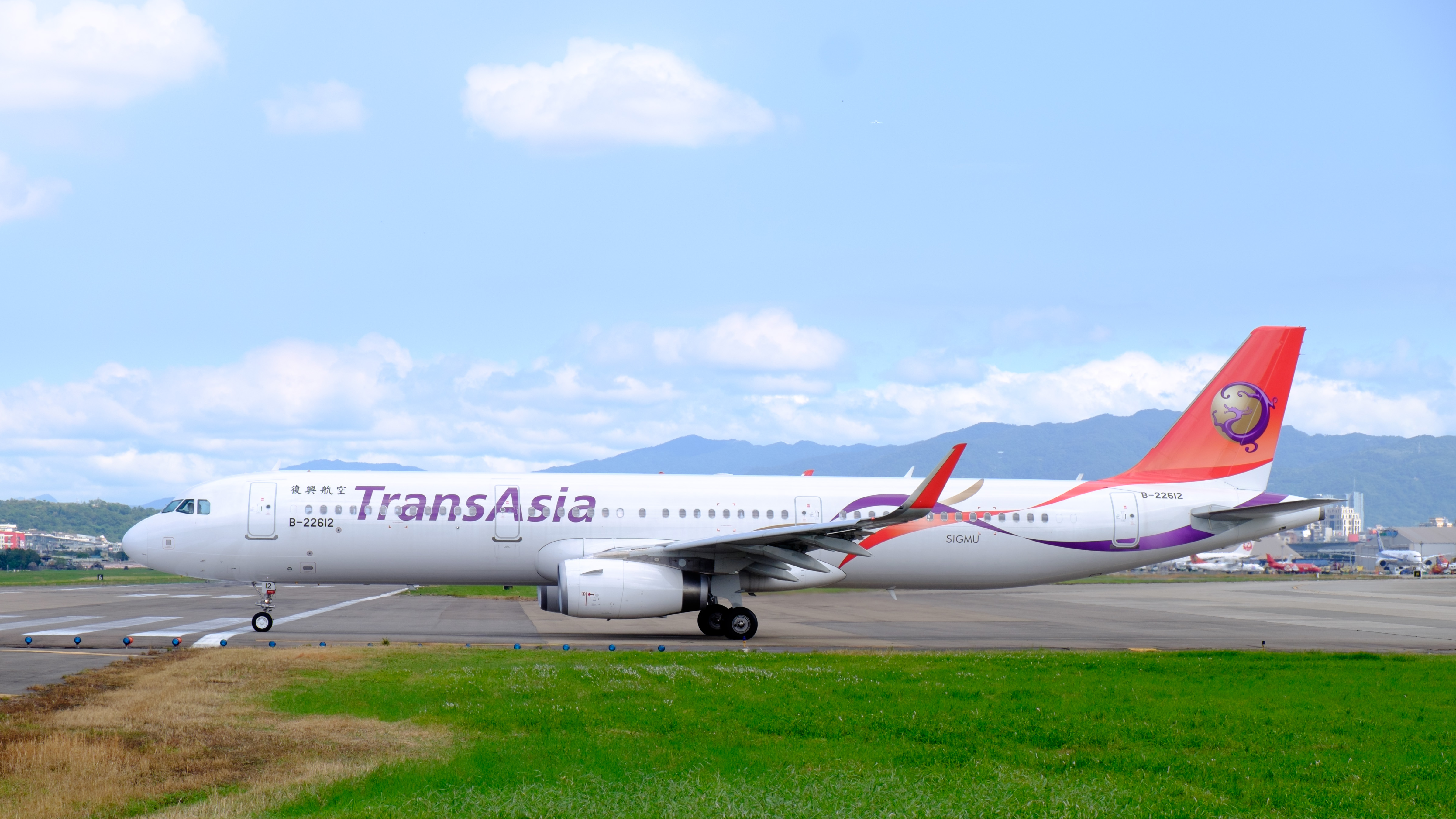 復興航空空中巴士A321-231 B-22612進入臺北松山機場跑道西端。